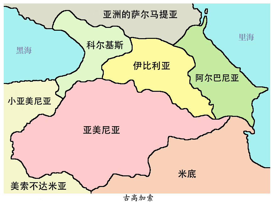 古代高加索